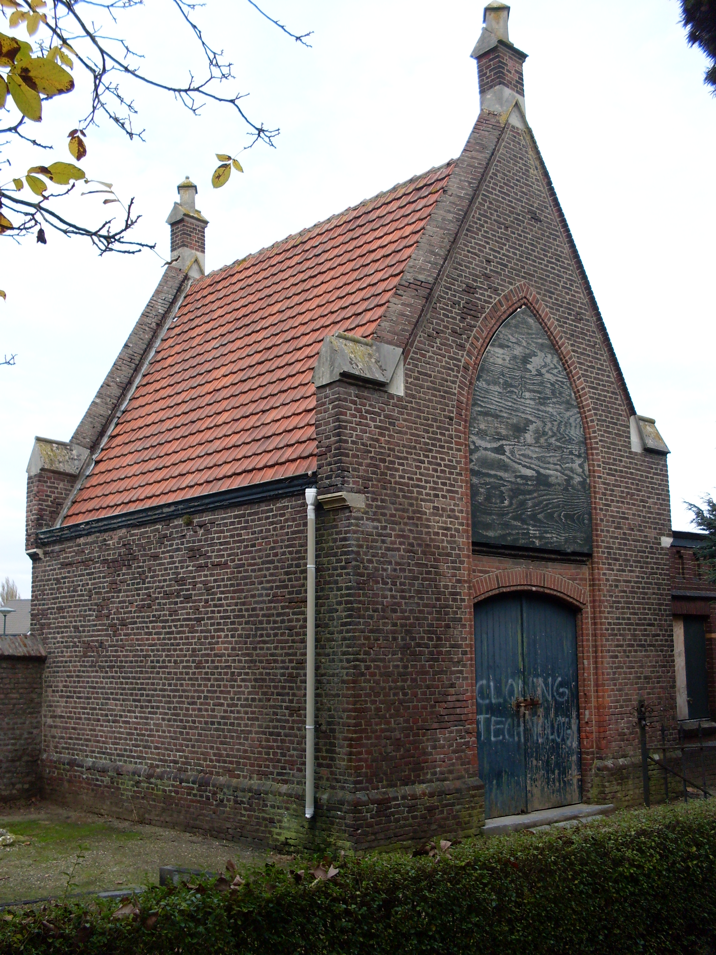 Lijkenhuisje op de oude begraafplaats Roermond